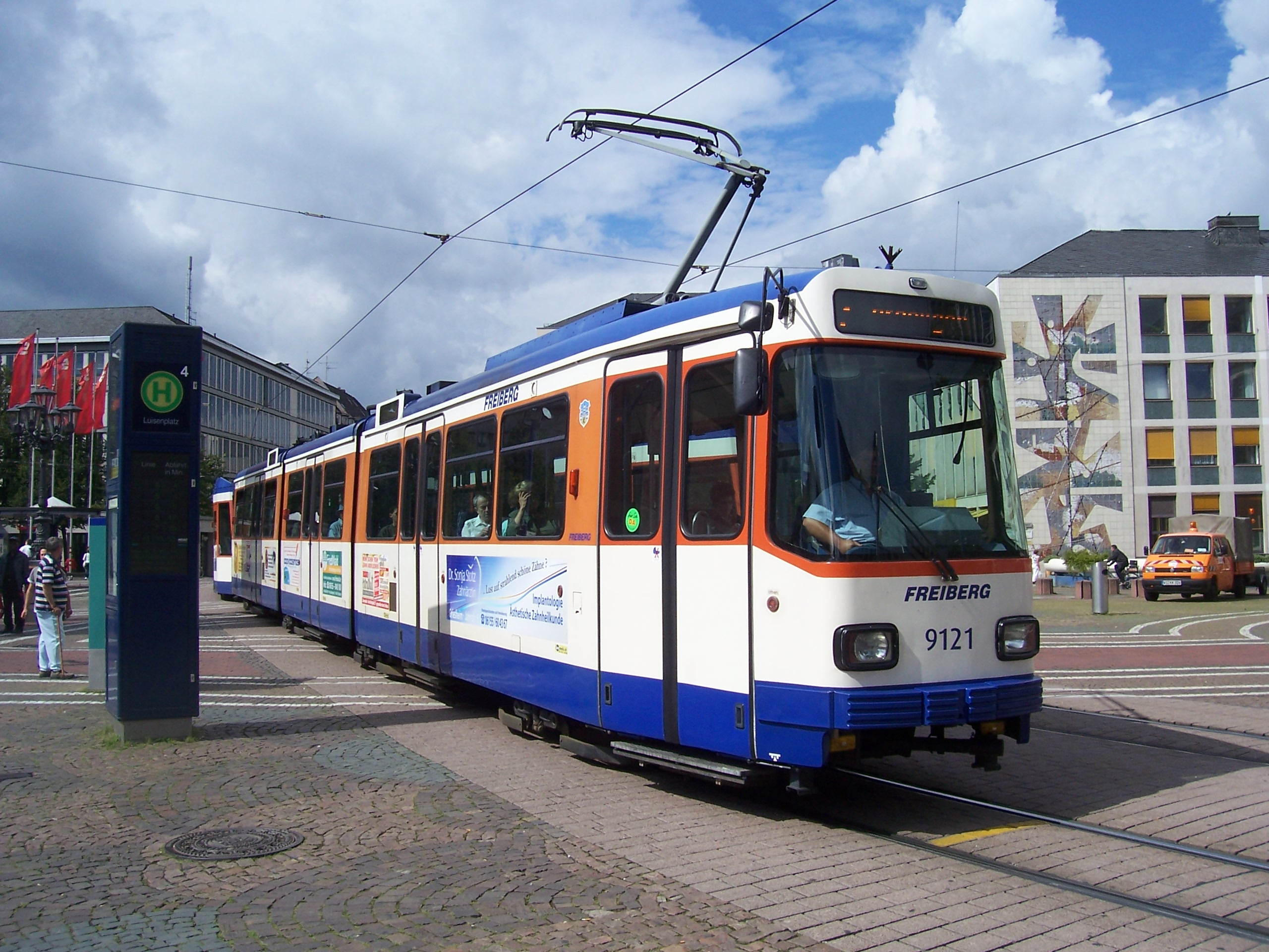 Straßenbahn 9121 der HEAG mobilio in Darmstadt am Luisenplatz